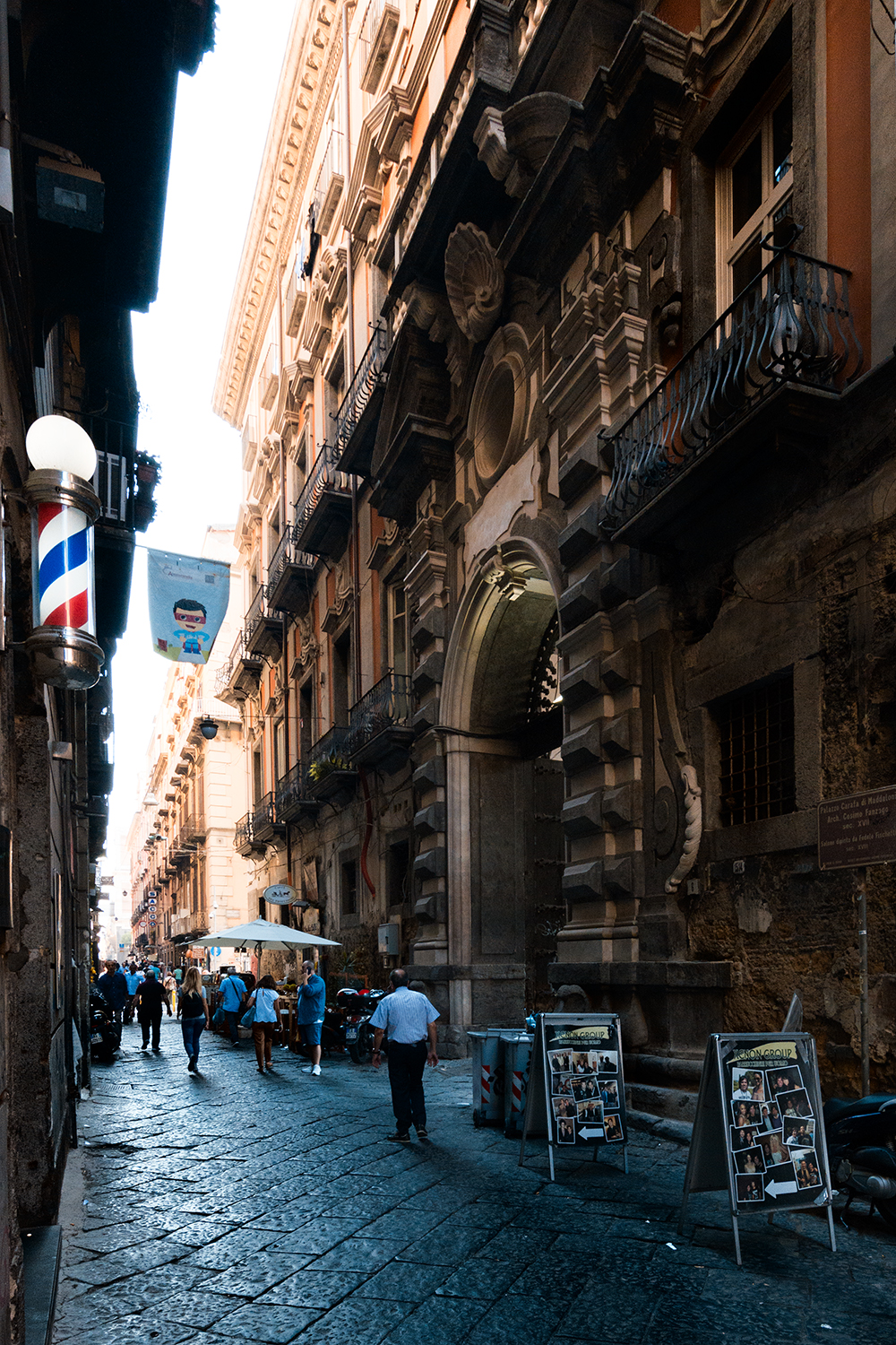 Portale di Cosimo Fanzago